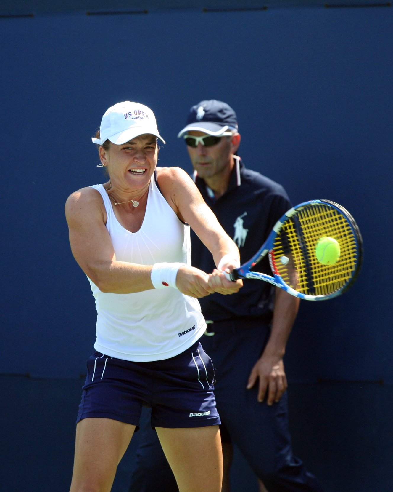 U.S. Open Aug. 31, 2010